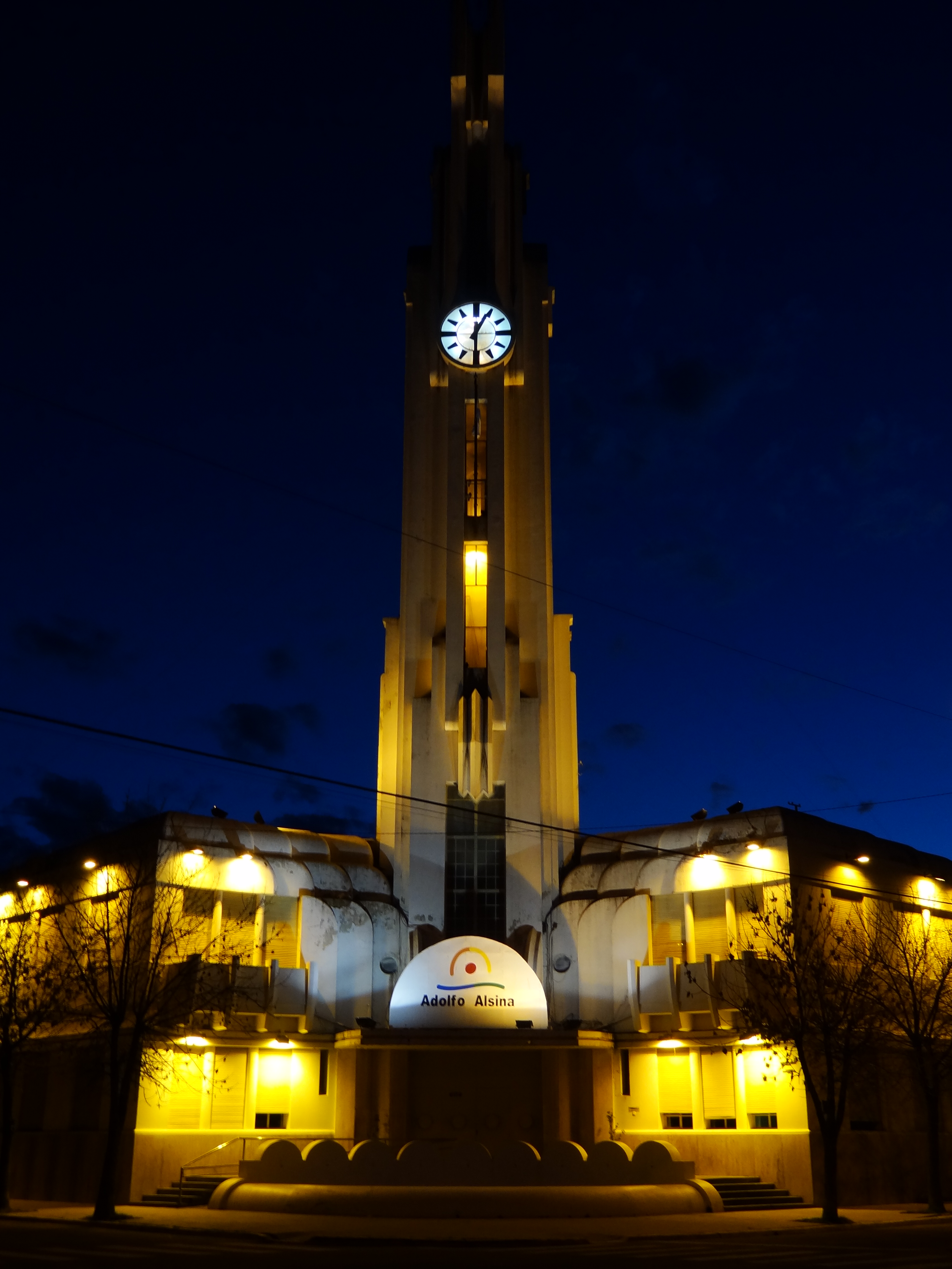 Edificio de la intendencia de Carhue y Alsina, de noche.